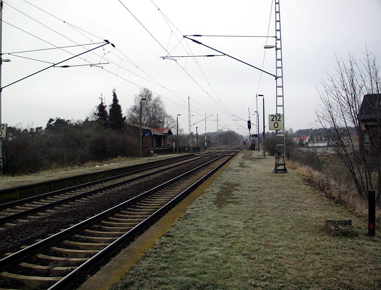 Bahnhof Griebo an der Bahnstrecke Wittenberg-Roßlau in Sachsen-Anhalt, Deutschland